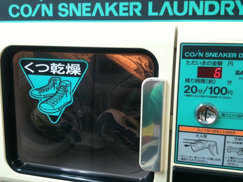 靴を洗濯してきました - from Brightkite [1]